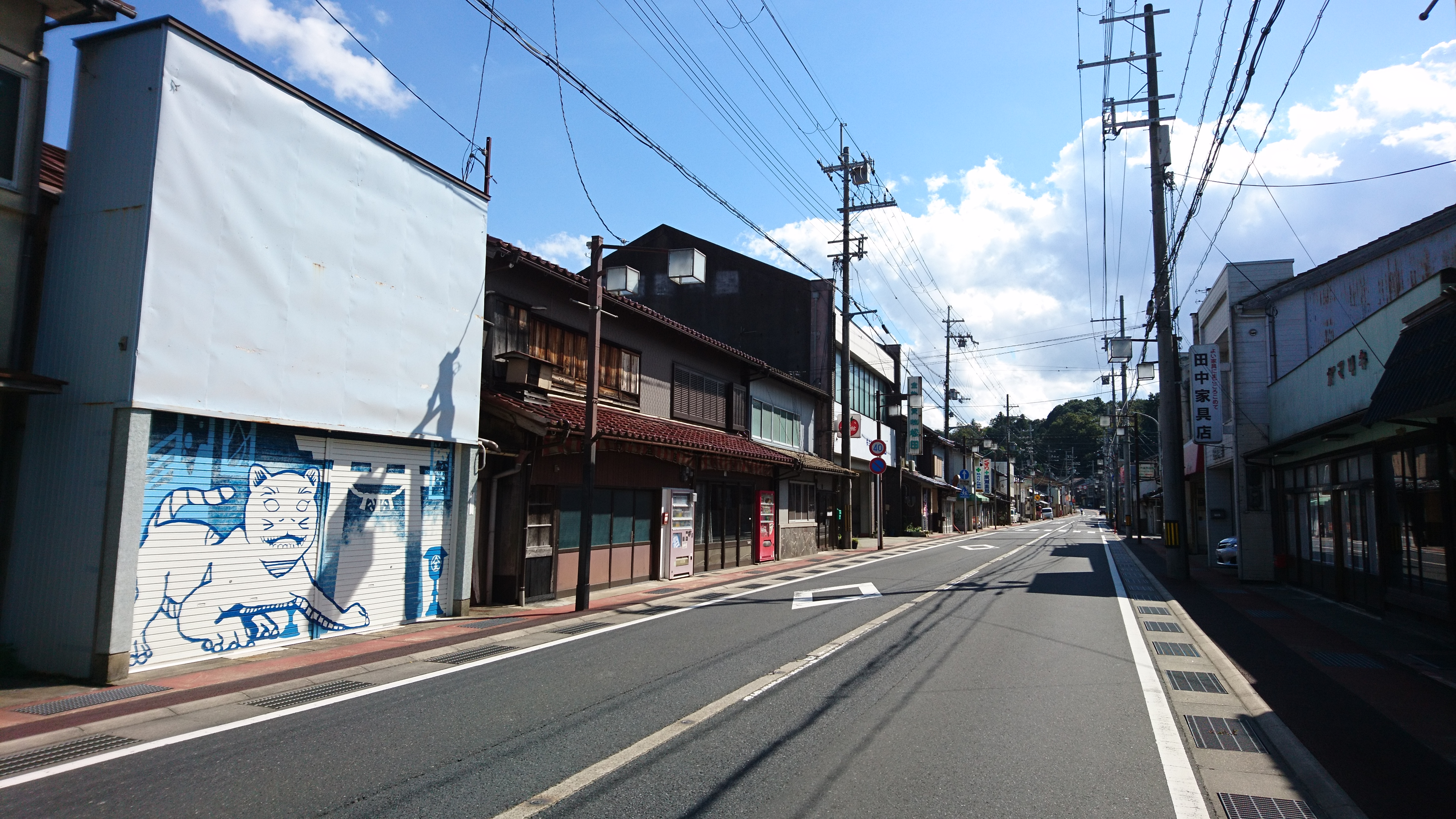 京丹後市峰山町のシャッターアート１号